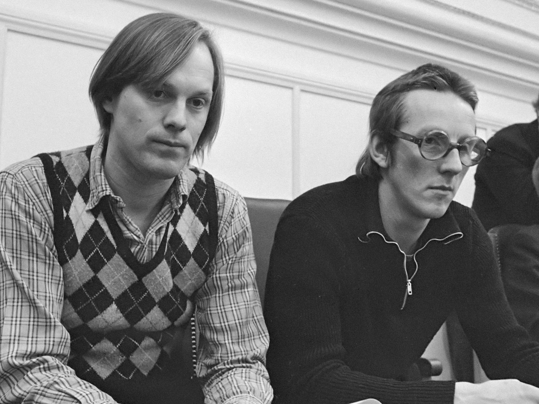 Tweede Kamer; vragen over WK; Bram Vermeulen en Freek de Jonge (Neerlands Hoop) op publieke tribune 23 februari 1978